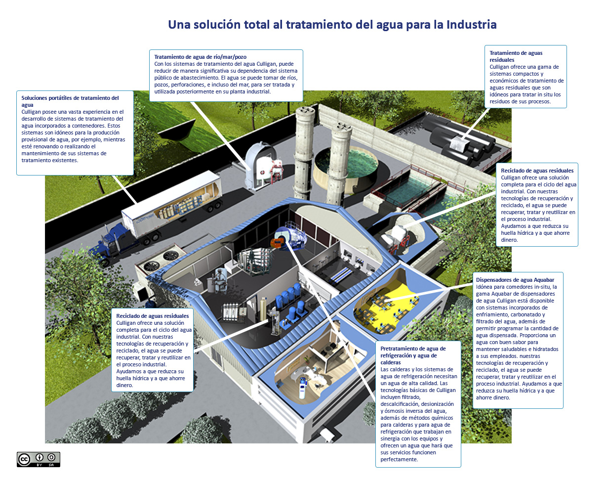 Diagrama de sistemas usados en el Tratamiento de agua en la industria